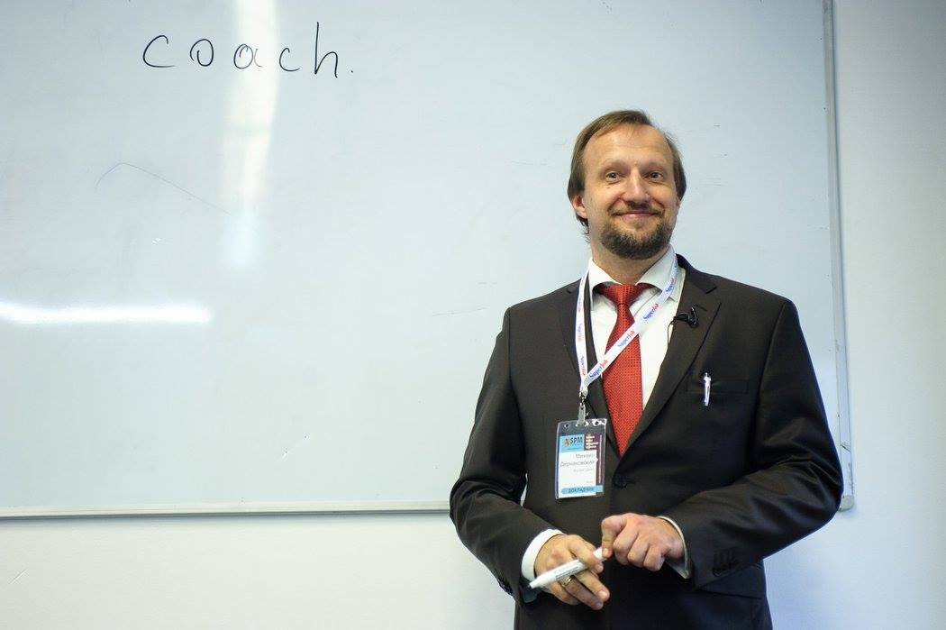 Выступление популярного Мастер-Коуча Дернаковского Михаила на конференции SPM 2015